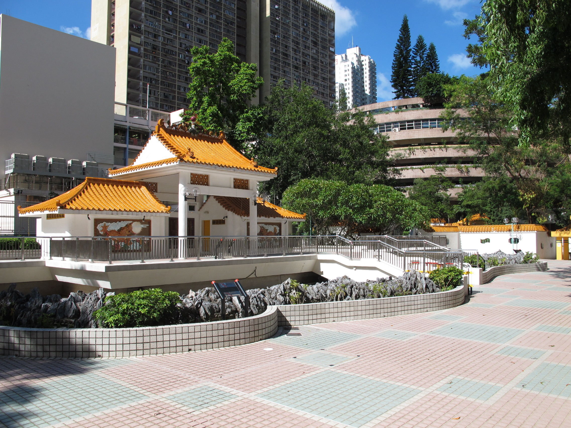 Lower Wong Tai Sin Estate Lung Tsui Park